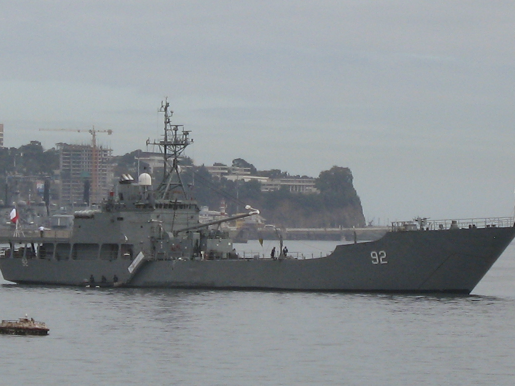 Barcaza LST-92 Rancagua